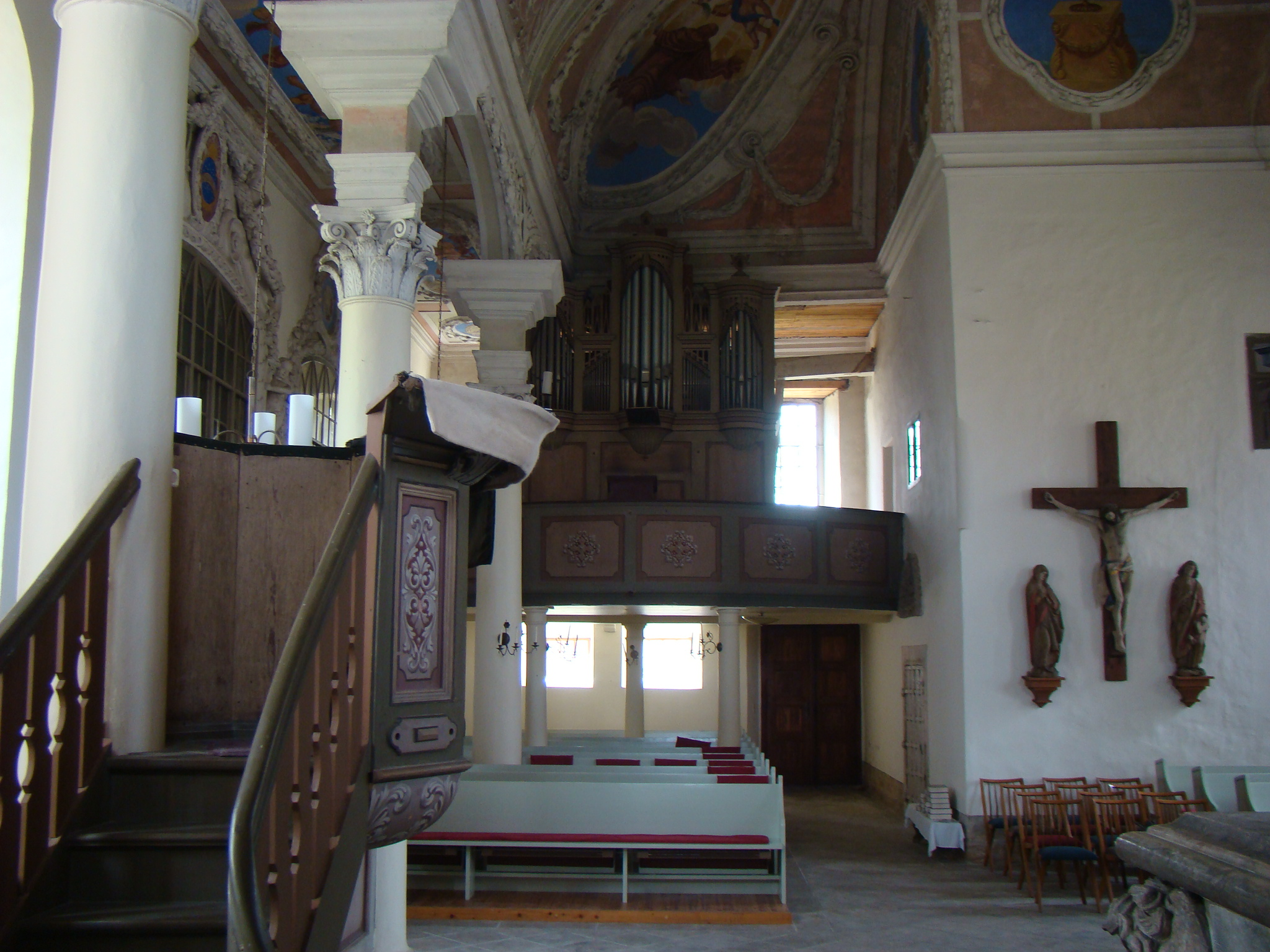 Stadtkirche Oppurg